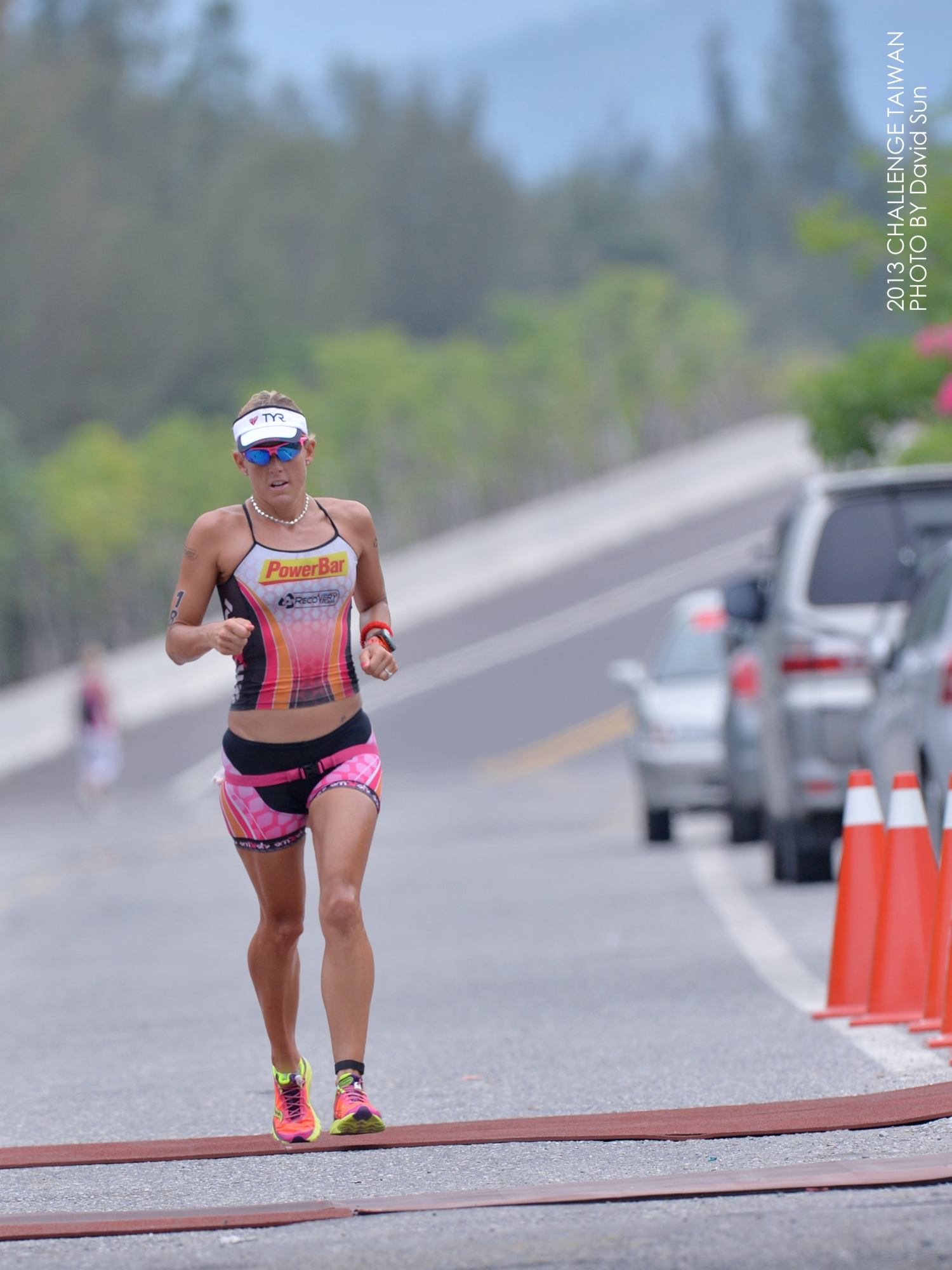 Hillary Biscay running at Challenge Taiwan